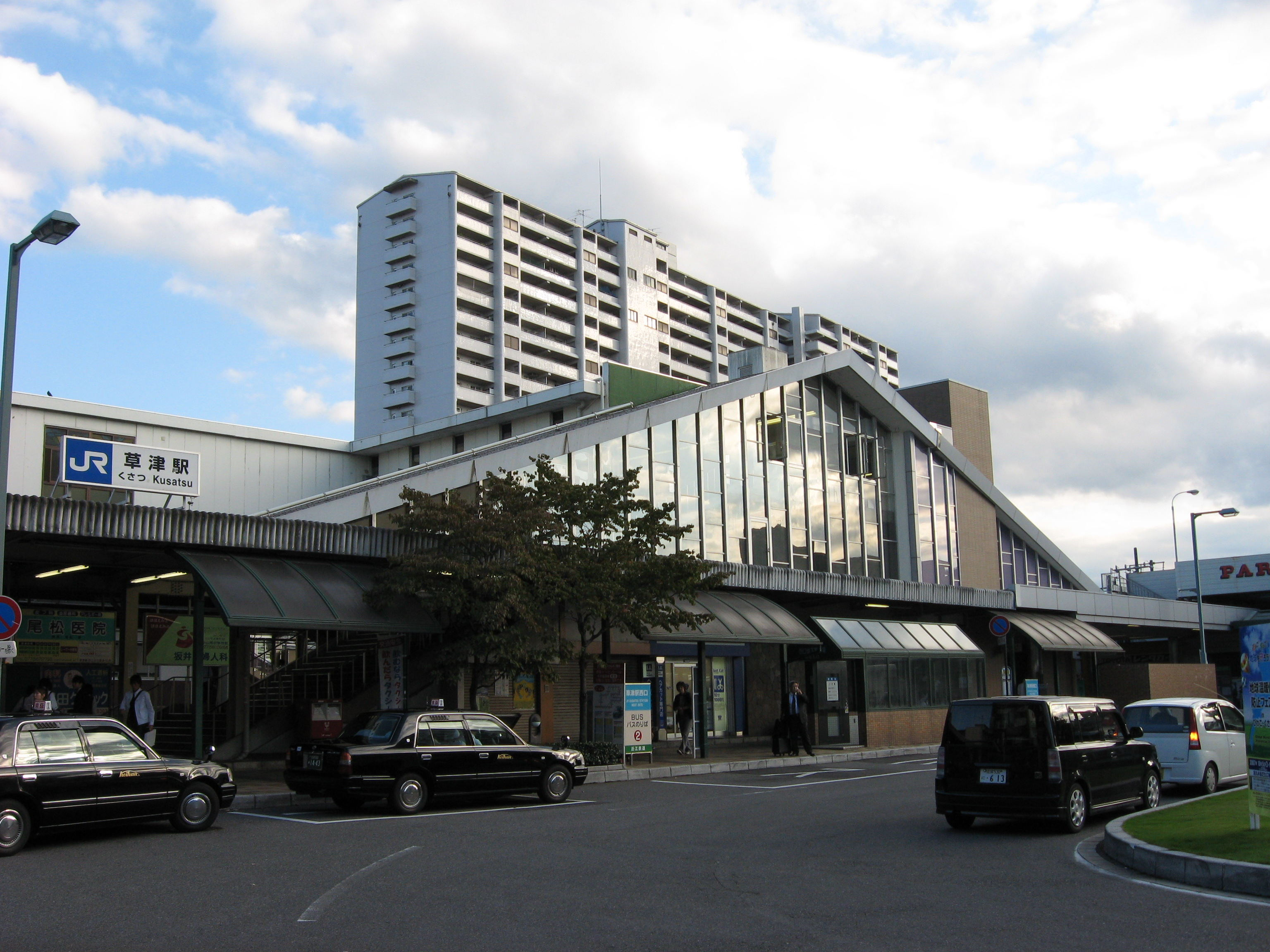 JR West Kusatsu Station West Side.